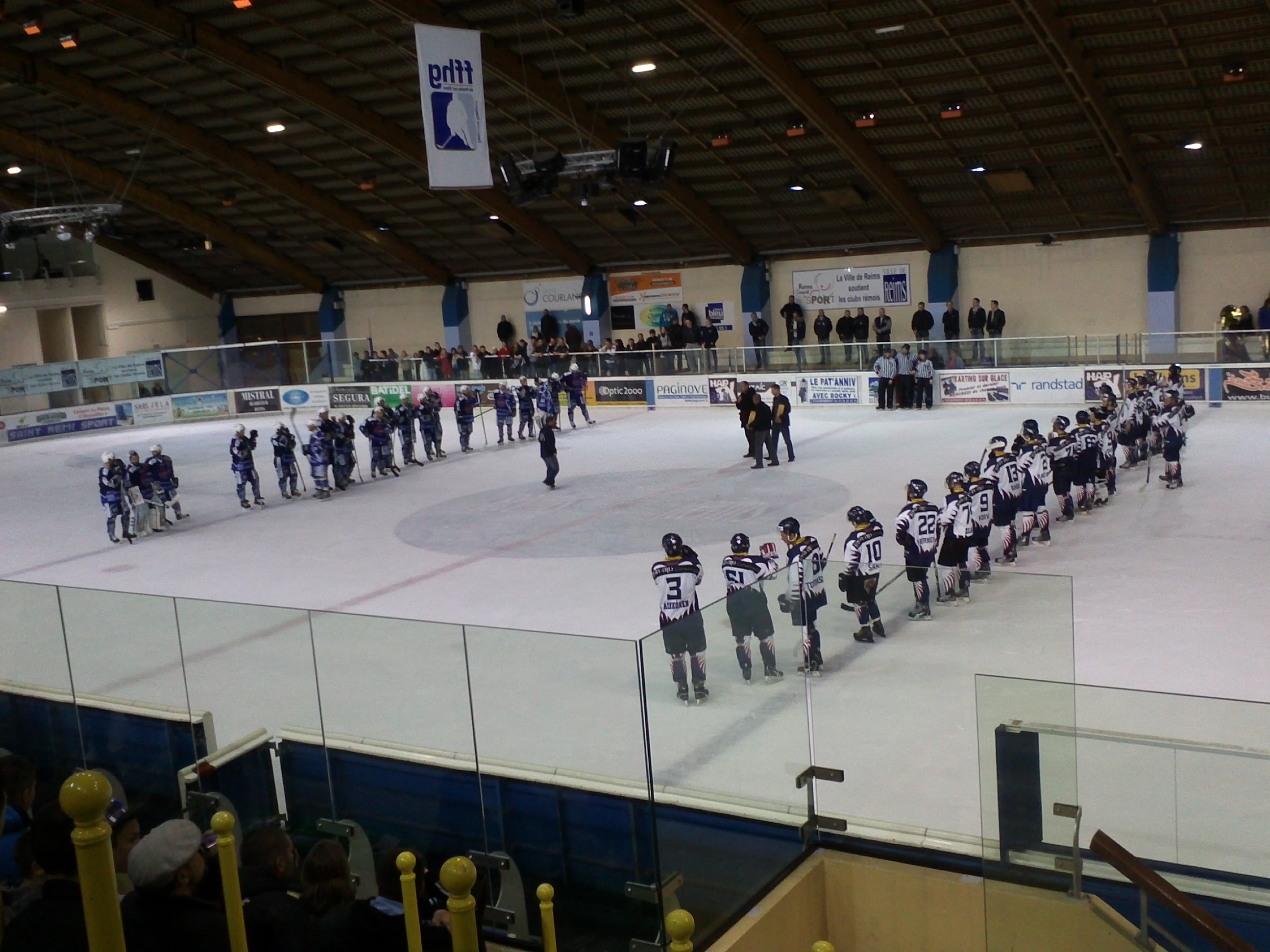 Cérémonie d'après-match de Phénix de Reims - Aigles de Nice